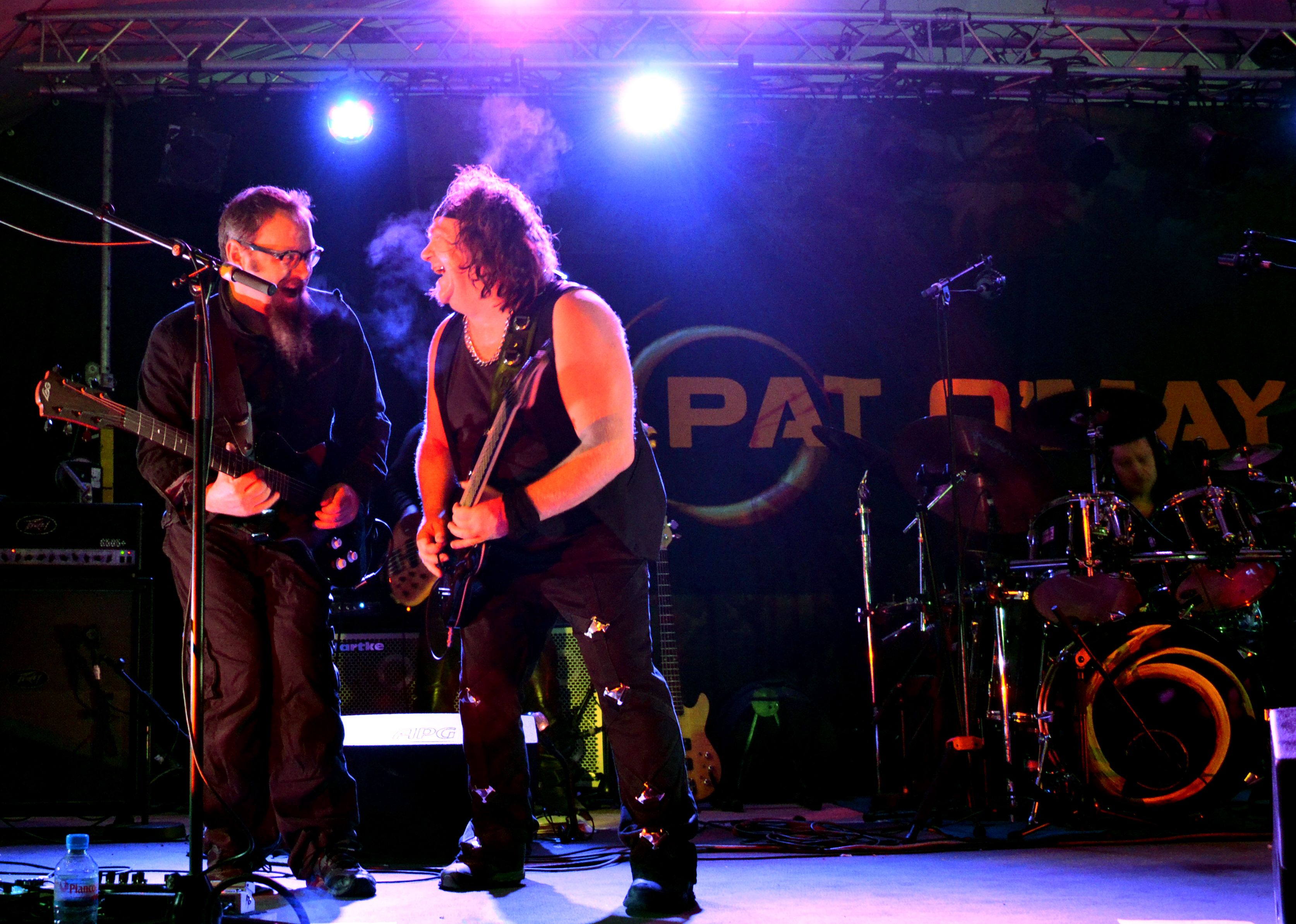 Concert rock celtique de Pat O'May au Festy'Jeanne, festival des Légendes Celtiques, à Plouégat-Moysan le 4 mai 2013.